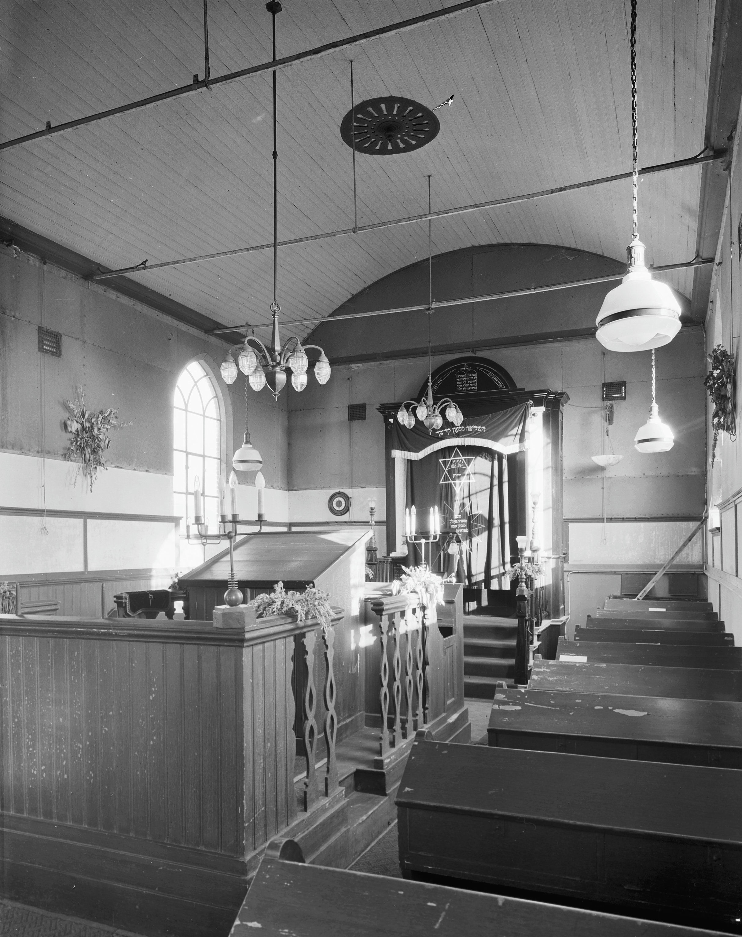 Synagoge: interieur naar het oosten